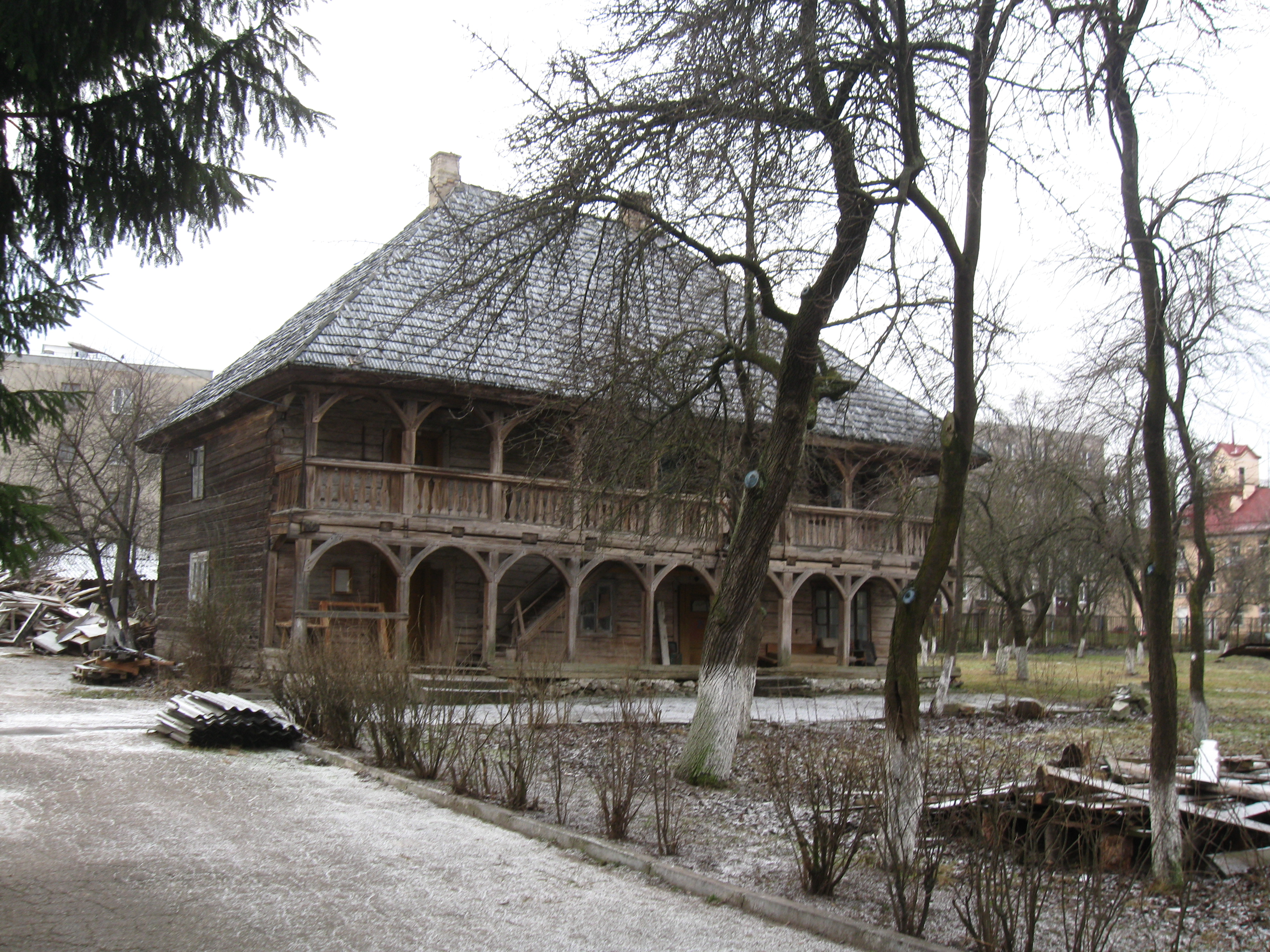 Беларуская (тарашкевіца): Ансамбль былога кляштара брыгітак:касьцёлжылы корпуслямусагароджа з брамай. г. Горадня This is a photo of Belarusian heritage monument. Reference number: 412Г000017 ( WLM)